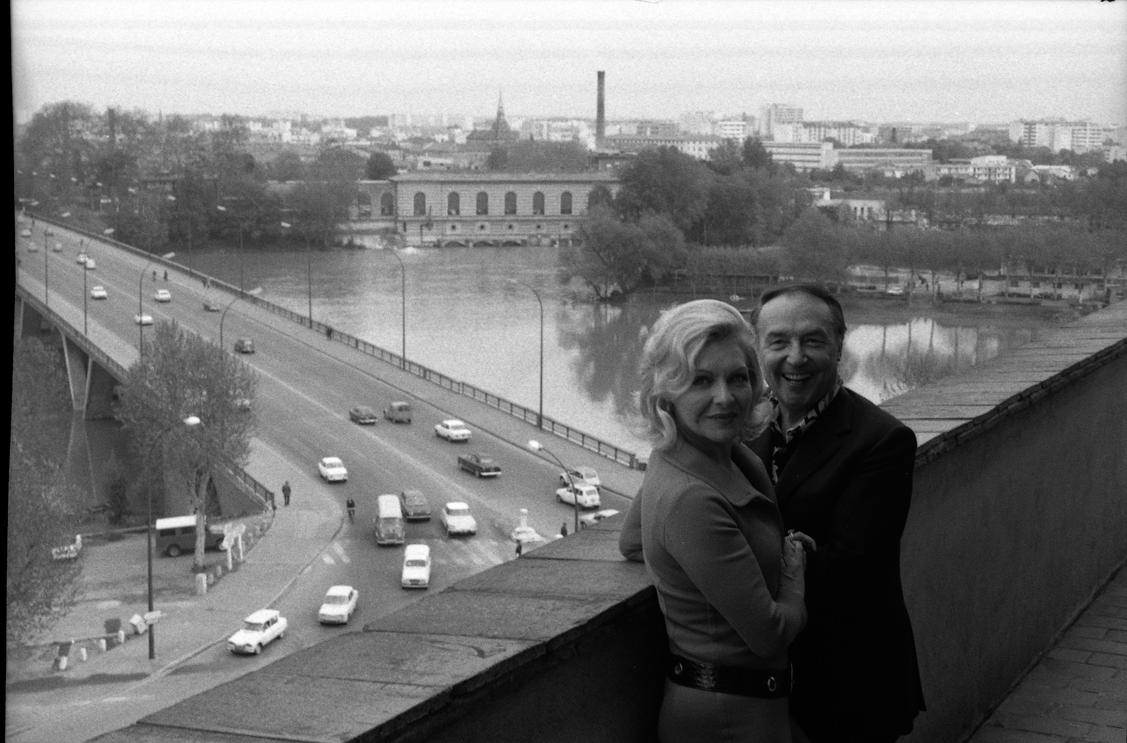 Extèrieur avec vue sur les toits de Toulouse. Le 5 mai 1972. Vue en contre plongée de Loulou Gasté (compositeur de chansons) aux côtés de sa femme, Line Renaud accoudée au balcon extèrieur d'un immeuble. En arrière plan à gauche de l'image on apperçoit le pont St Michel , au centre l'usine hydroélectrique municipale et à droite un bout de l'île du Ramier.